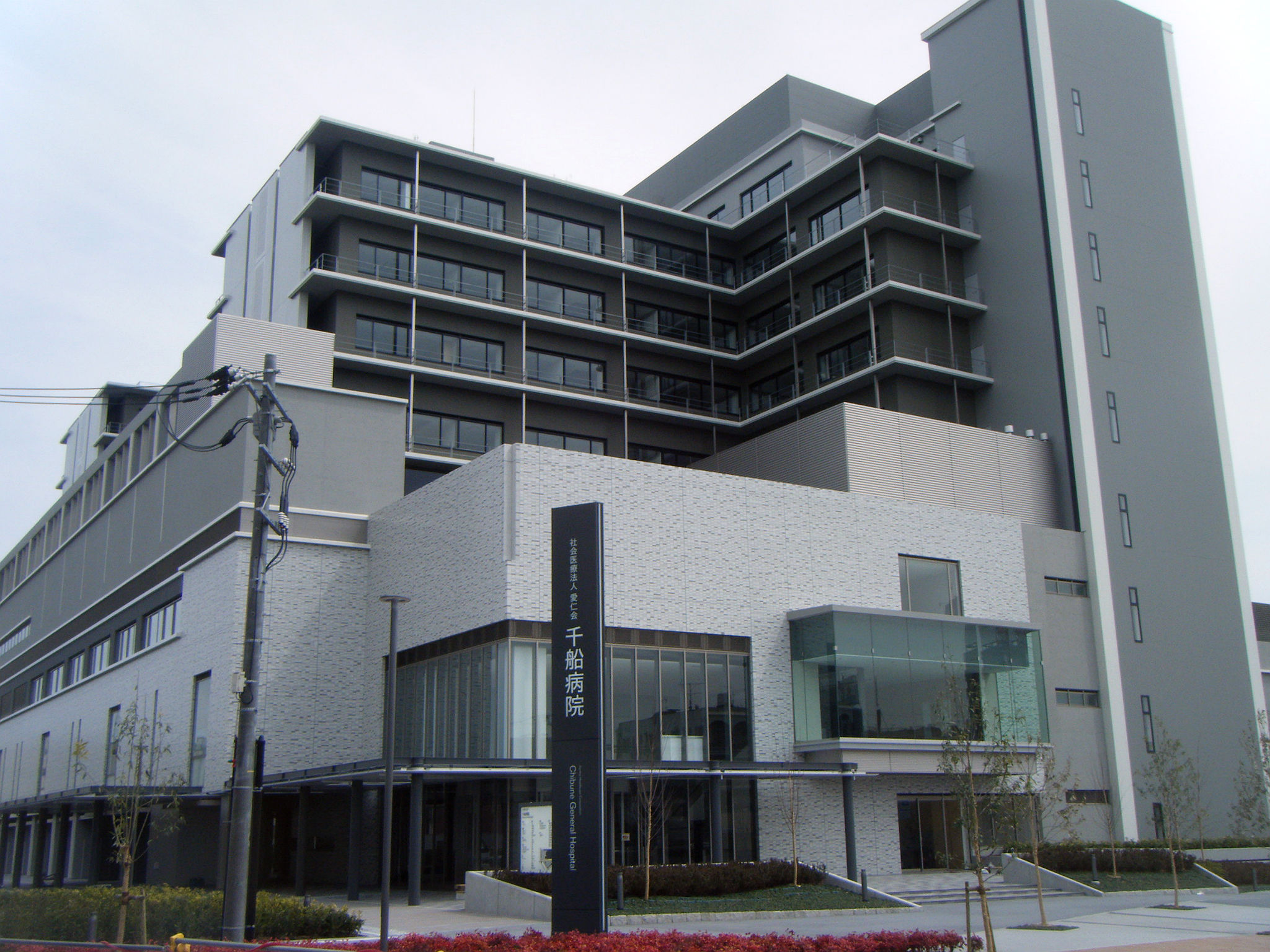 千船病院 2017年7月1日、大阪市西淀川福町へ移転予定の新病棟。